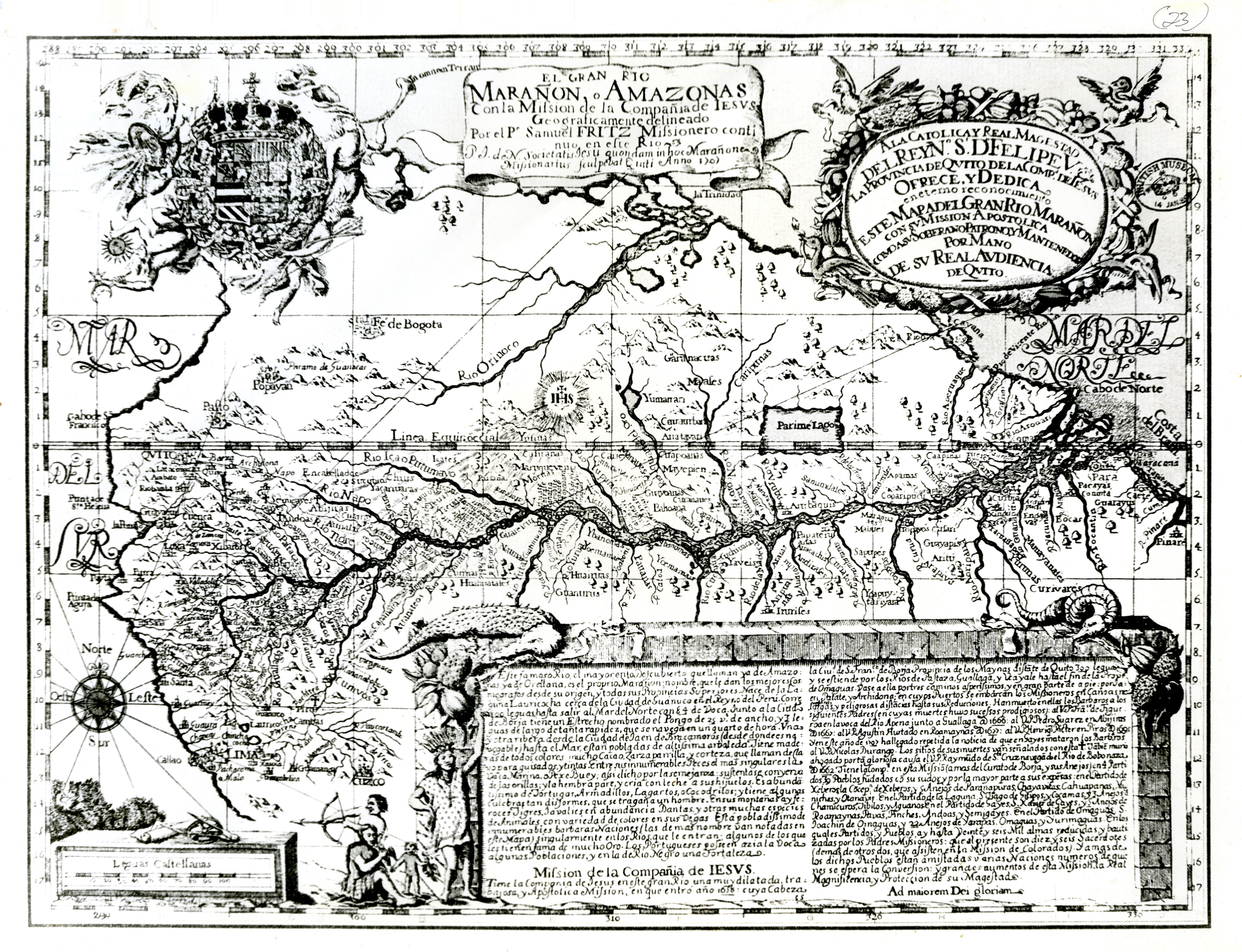 Diapositiva de Consulta y acceso publico cuya información fue investigada de un libro y/o ejemplar de revisión custodiado en los Fondos Cartográficos (Sección Siglo XVIII o Etapa Colonial) del Archivo Histórico del Guayas; Guayaquil, Ecuador.Consultado y compartido por el usuario J. Javier García A.